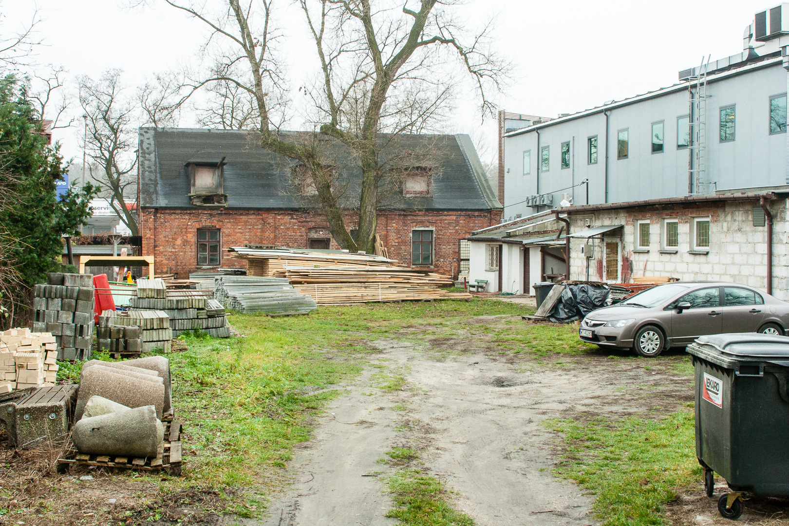 Murowanka czyli dawna szkoła w Wawrze. ul. Płowiecka 77, Warszawa